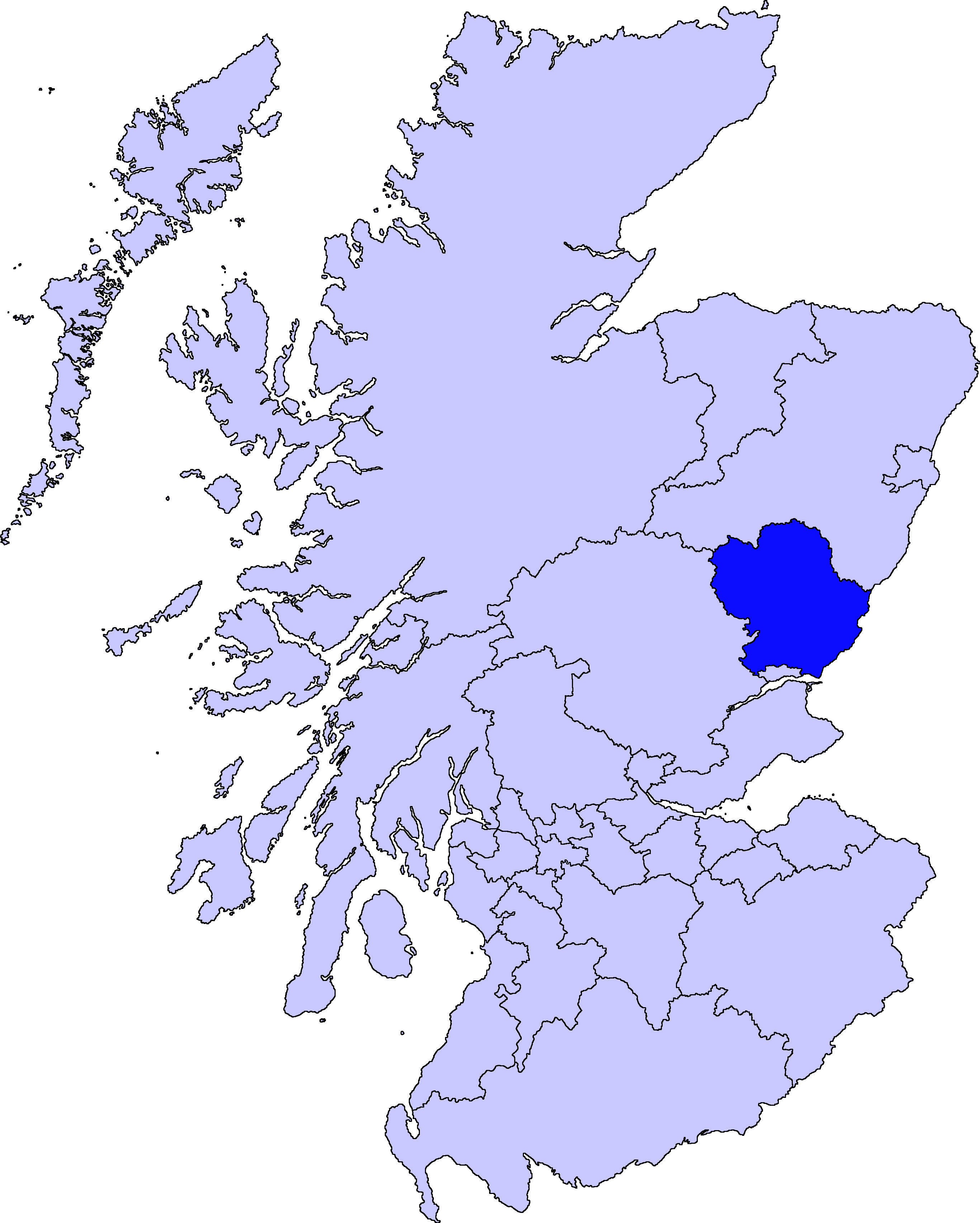 map of Angus